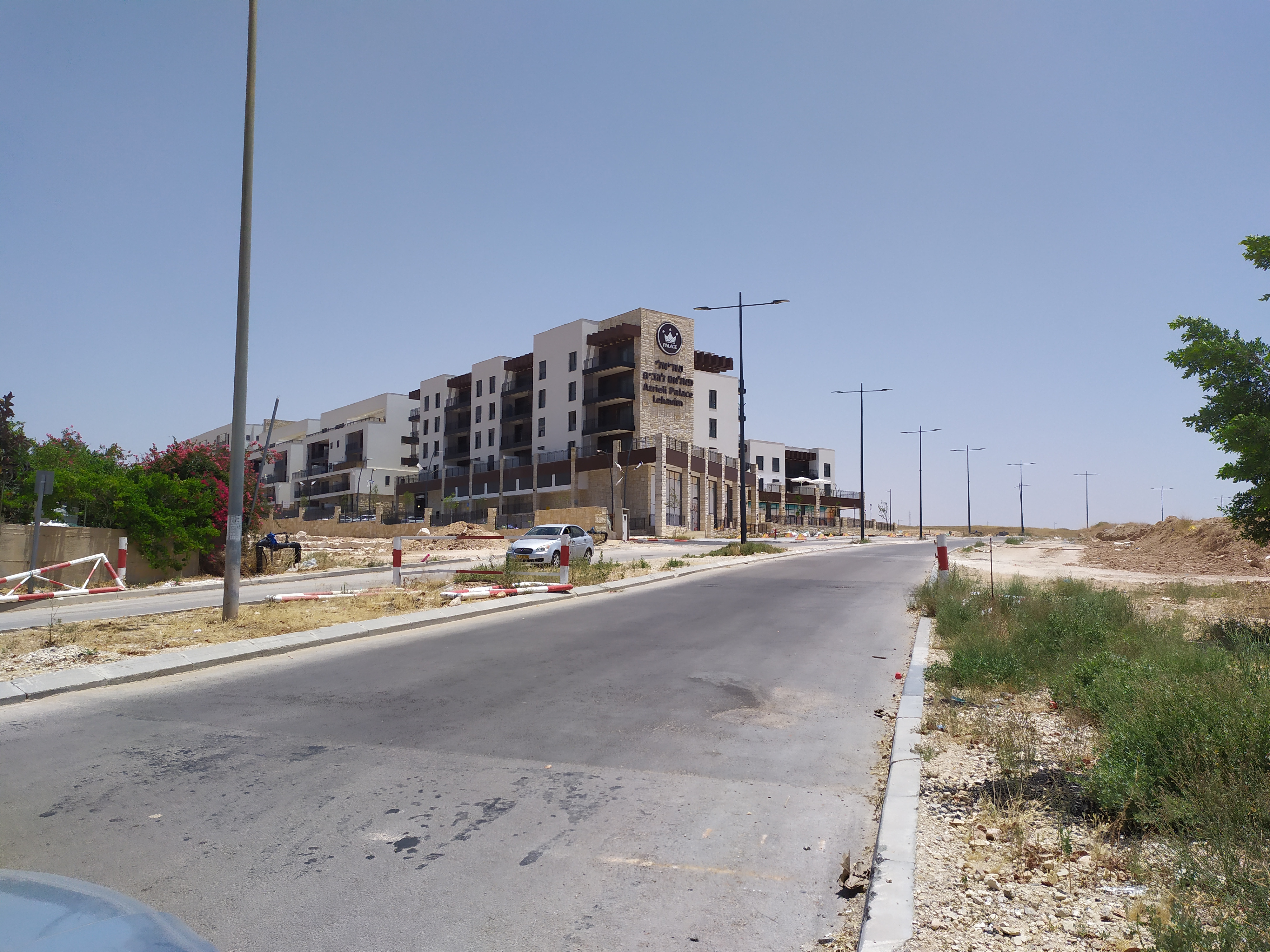 בית האבות פאלאס להבים בצפון שכונת שרונית